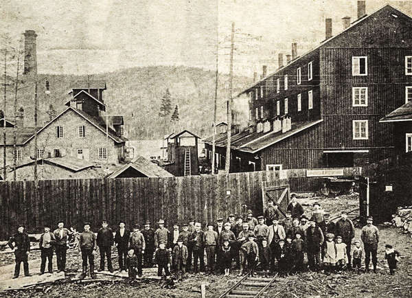 Grötingen village, Bräcke municipality, Jämtland, Sweden.